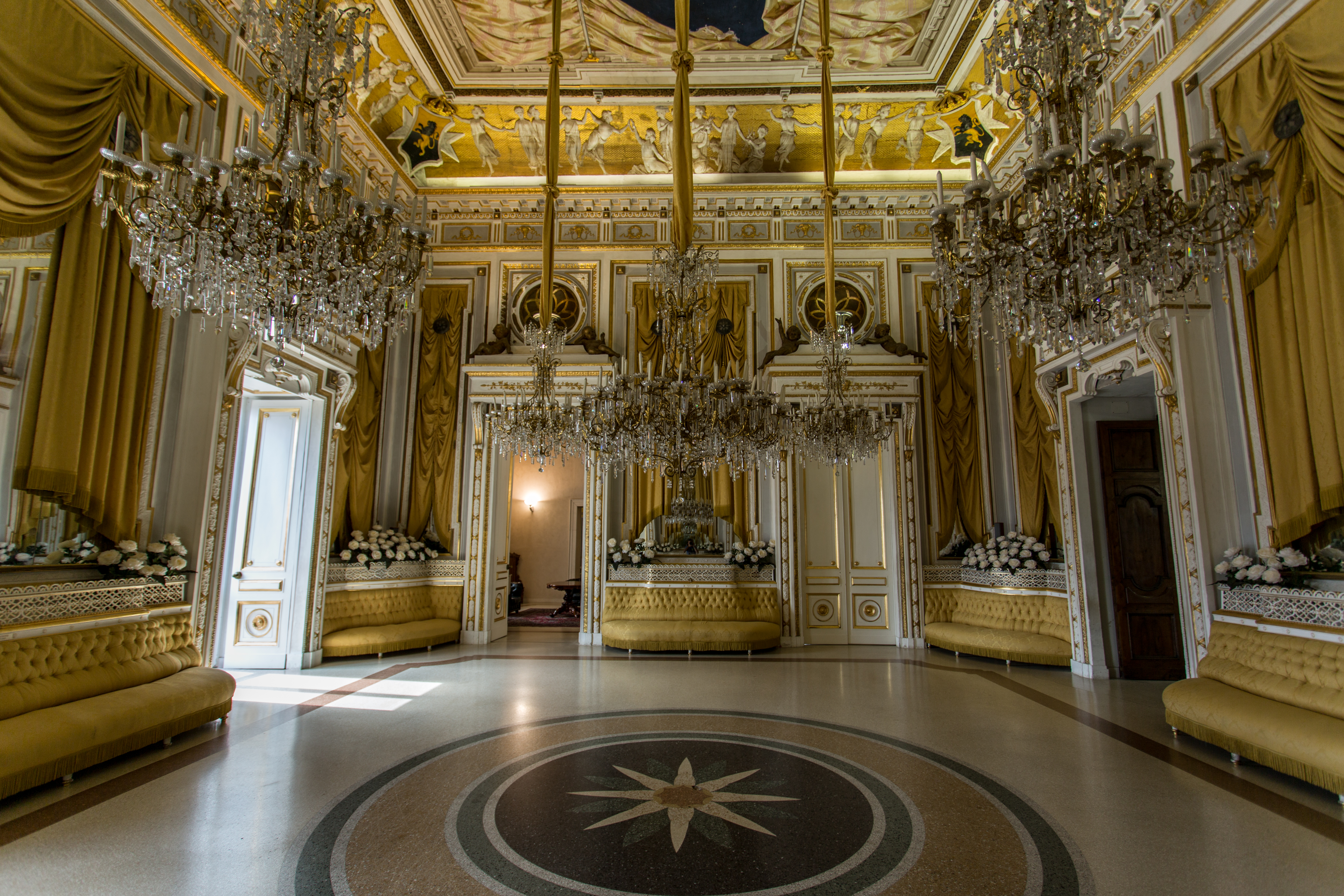 Castello Ducale This is a photo of a monument which is part of cultural heritage of Italy.